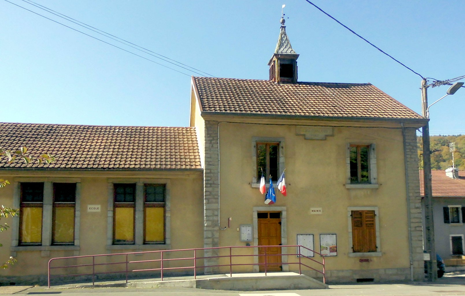 La mairie de Noirefontaine